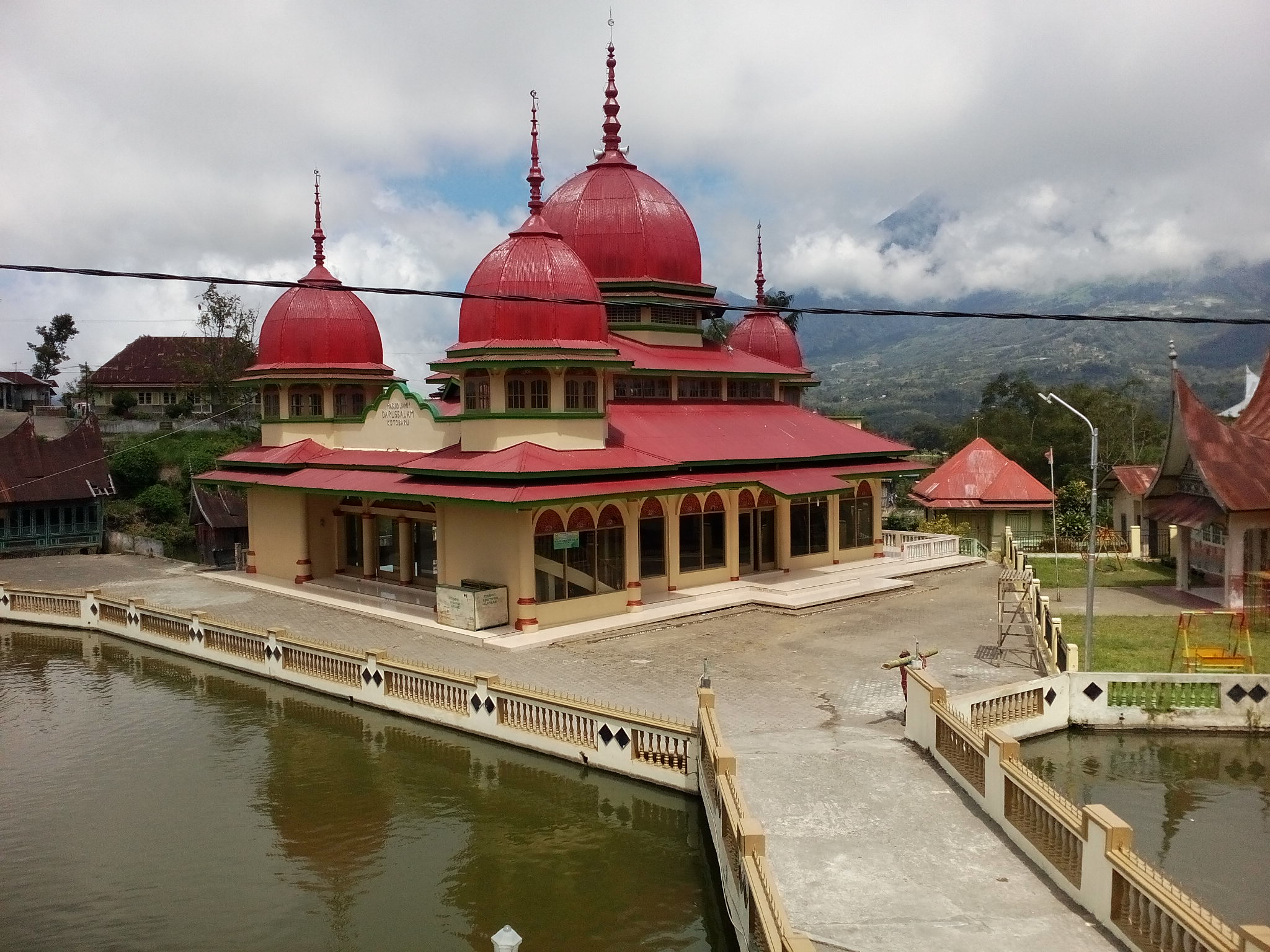 Masjid Darussalam Kotobaru